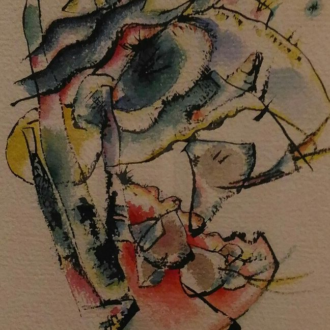 kandinsky